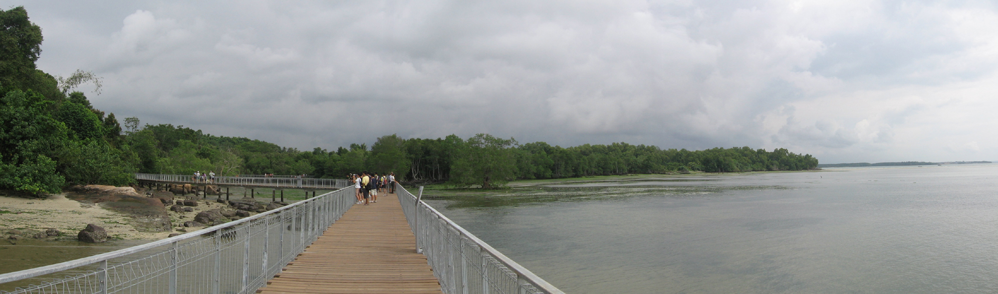 Chek Jawa, Pulau Ubin, Singapore